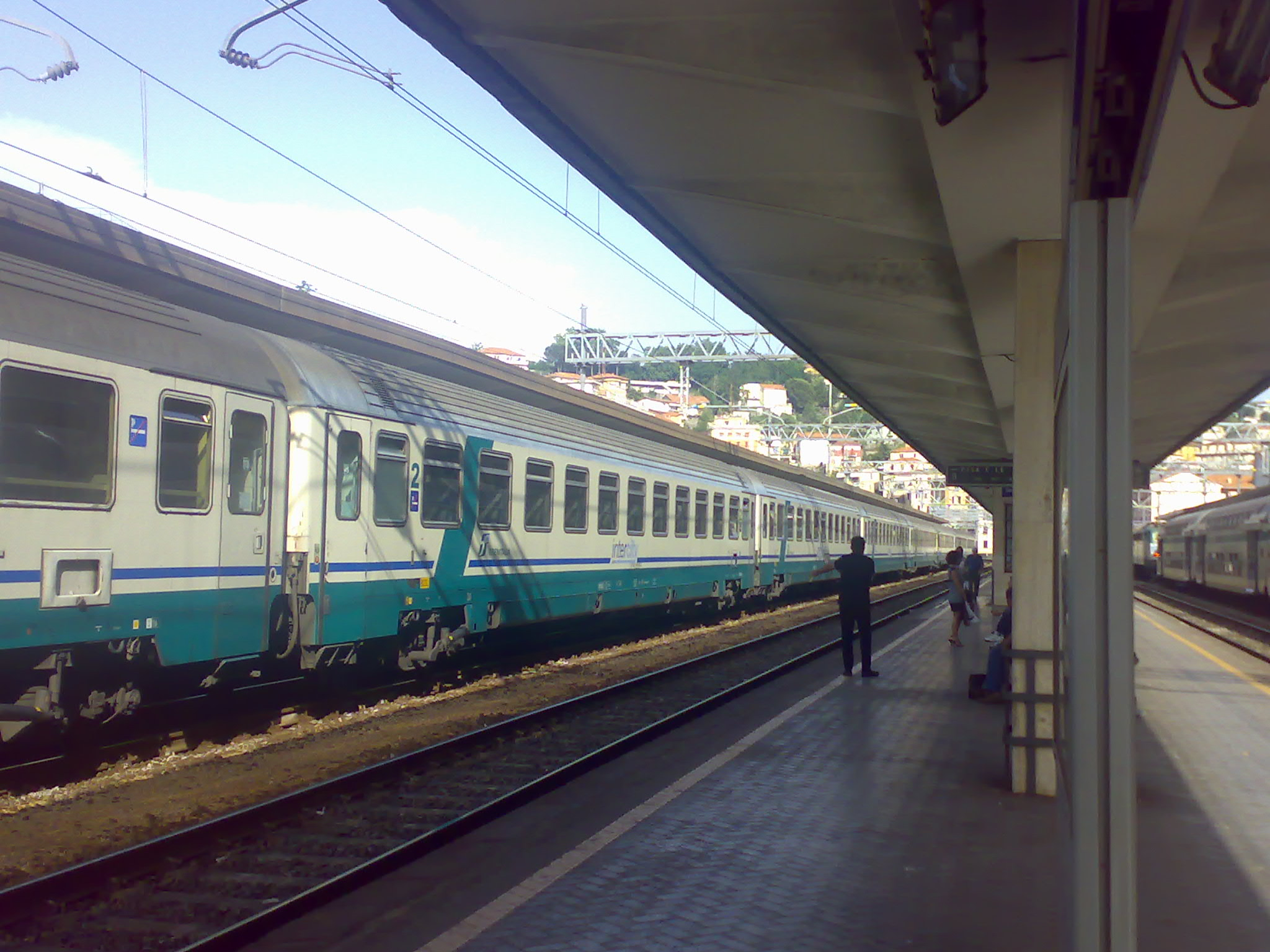 Vista della pensilina tra i binari 2/3